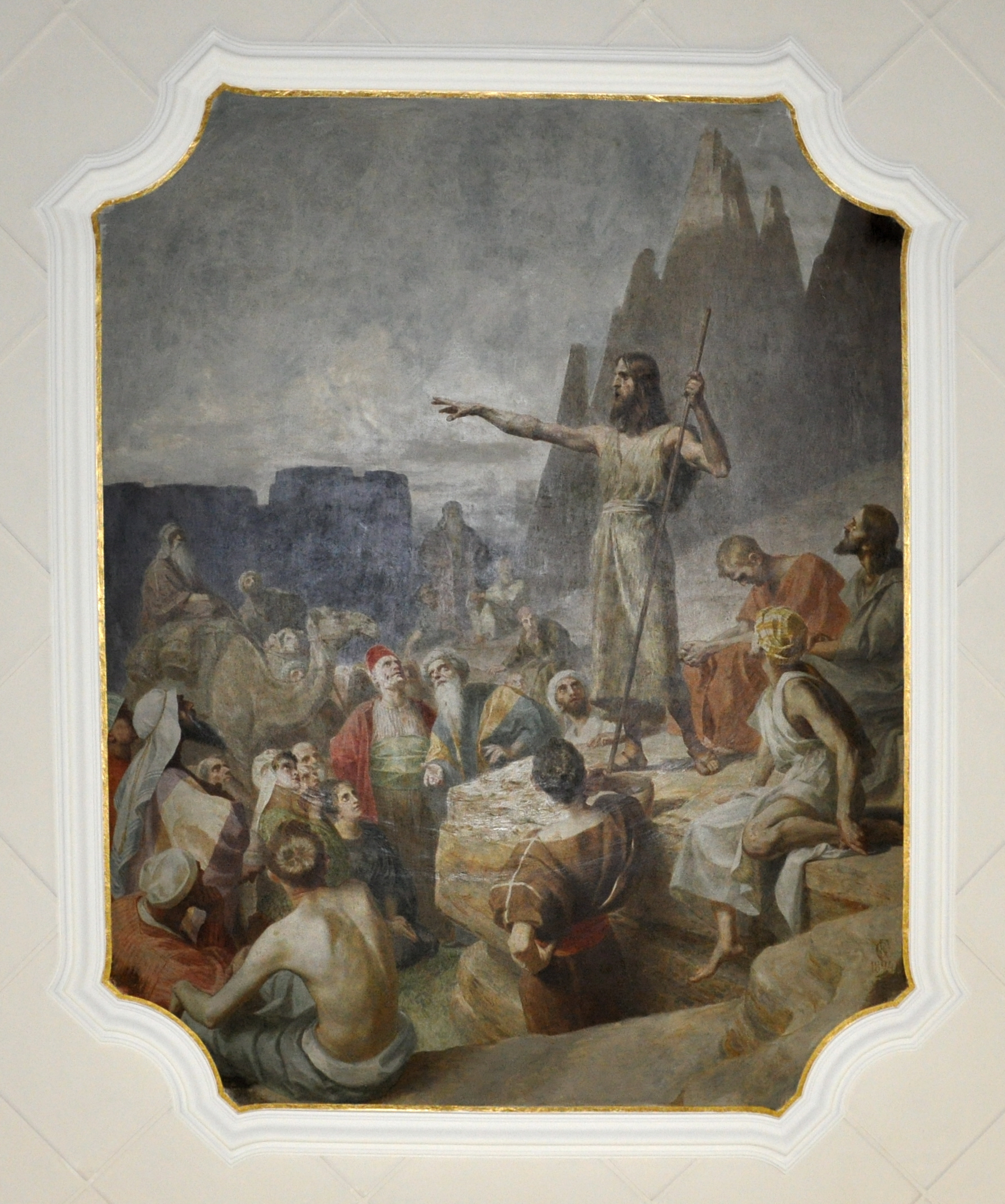 Kath. Pfarrkirche St. Johannes Baptist, Obereschach, Stadt Ravensburg Fresken von Gebhard Fugel, 1893/1894 Predigt Johannes des Täufers